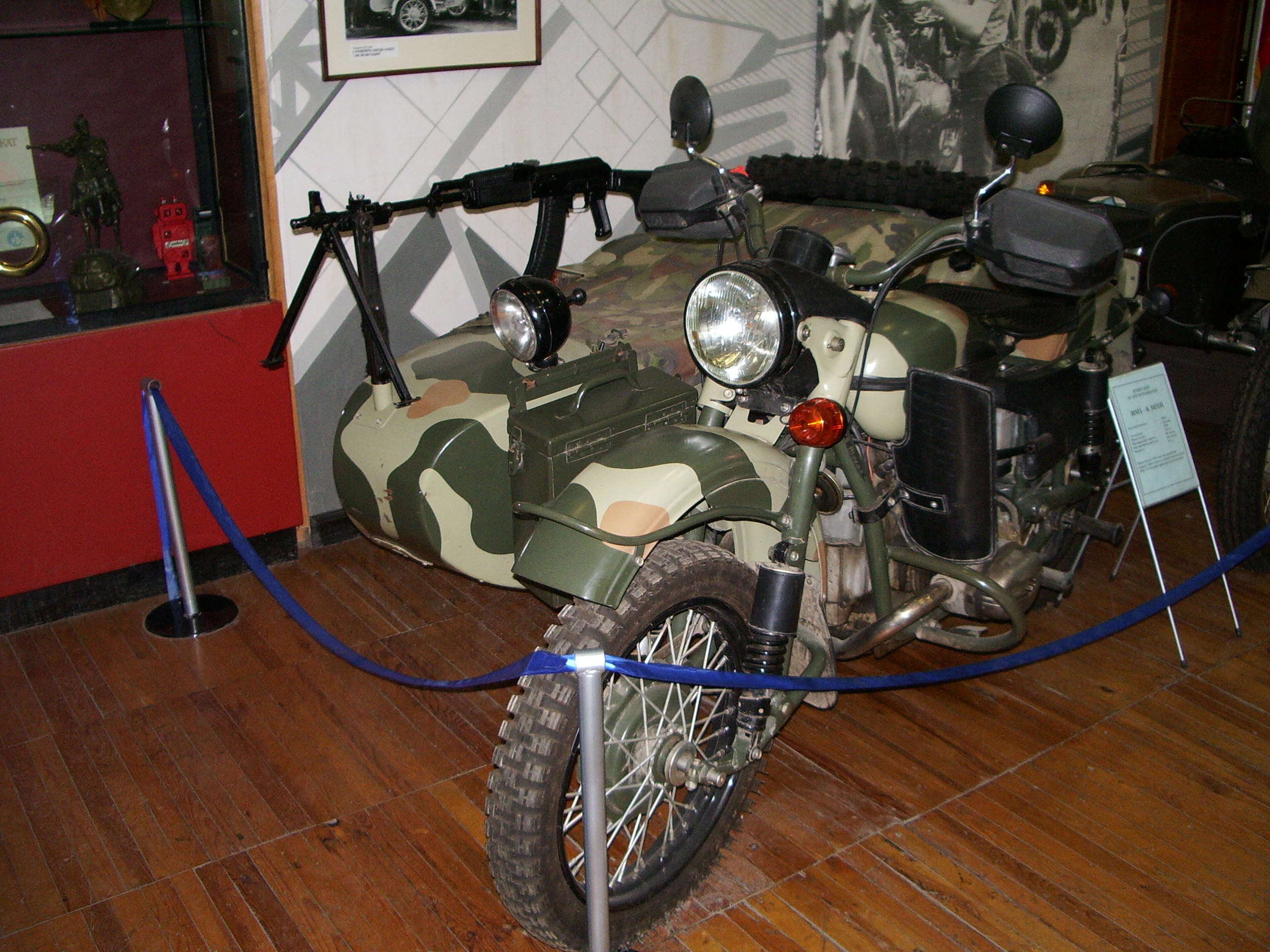 Ирбитский музей мотоциклов